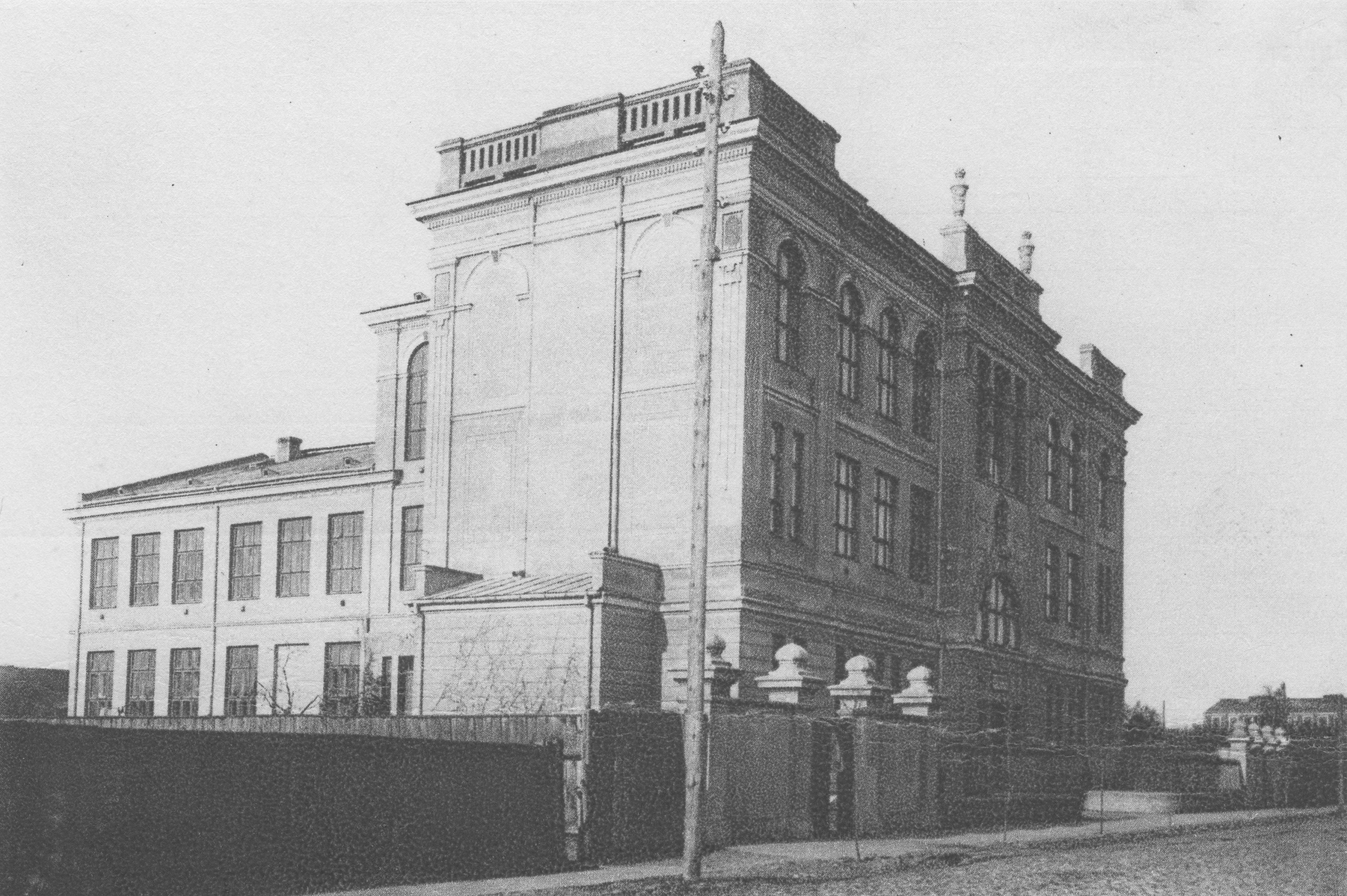 Budynek Państwowego Gimnazjum Męskiego im. Władysława Jagiełły w Płocku.